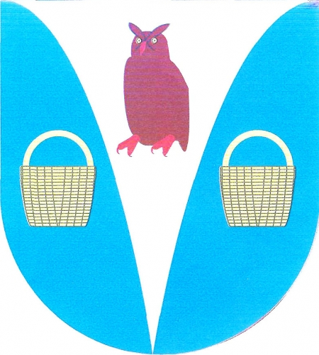 znak, Výrovice, okres Znojmo